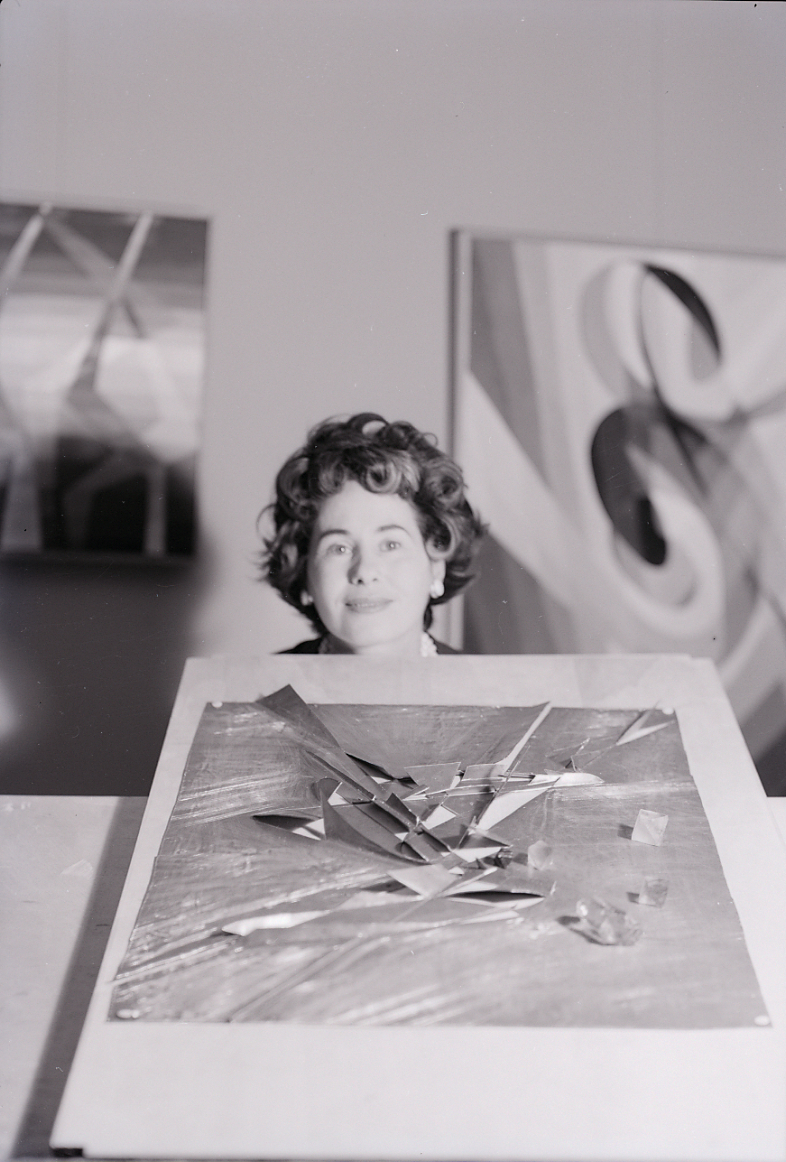 Servizio fotografico : Italia, 1965 / Paolo Monti. - Buste: 3, Fototipi: 3 : Negativo b/n, gelatina bromuro d'argento/ pellicola ; 6x6. - ((Serie costituita da 3 negativi identificati con i nn.: R14349-14451. Sulla busta del negativo R14349 manoscritto: "Vigevani". La suddetta serie è contenuta nella scatola identificata con la numerazione R14207/R14356. Sul coperchio della scatola, manoscritto a pennarello: "Ritratti".